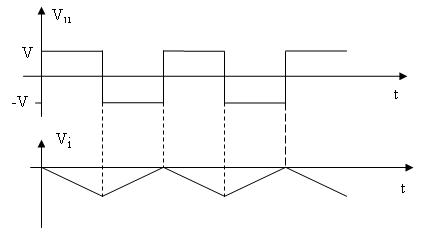 (Ja sam autor ove slike, koristim je za seminarski rad i predajem je u javno vlasništvo)